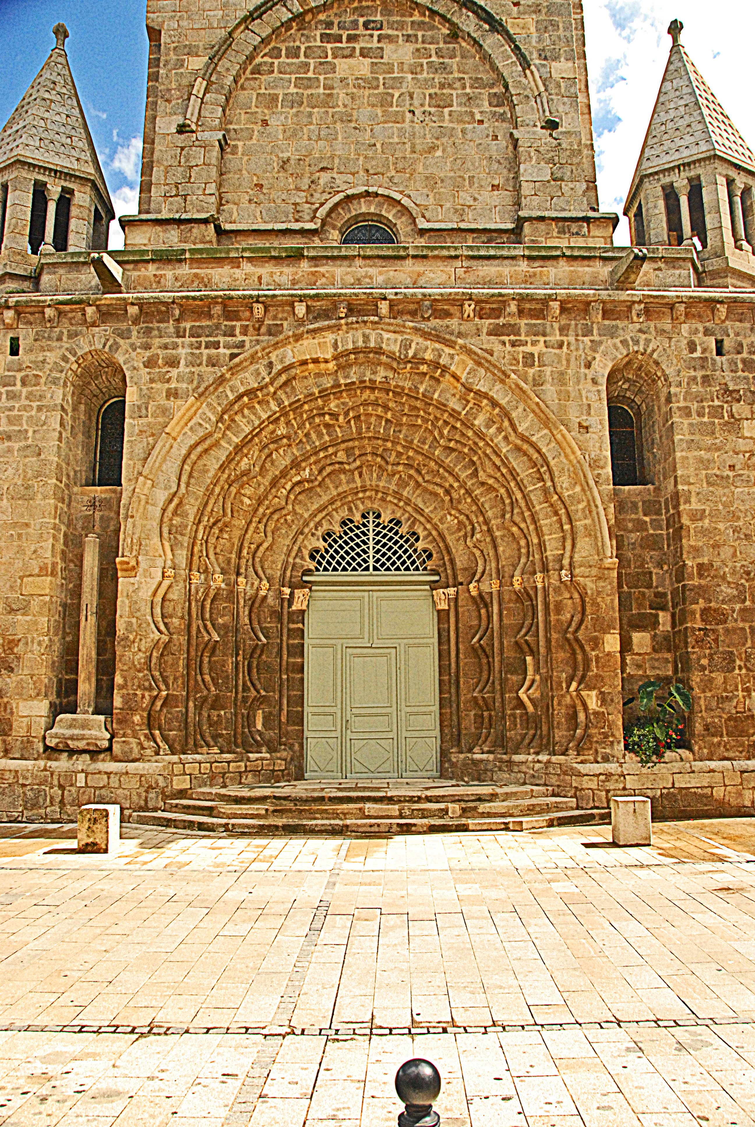 N.-D. de La Souterraine, Fassade von W